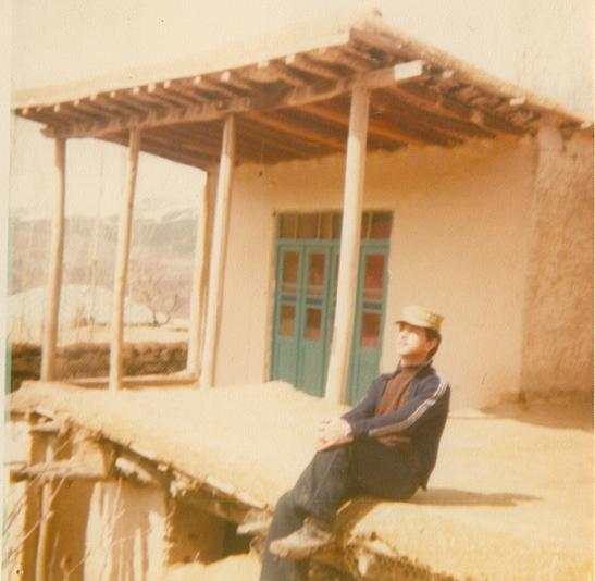 معماري قديم (دهه 50 به قبل) روستاي باريكان